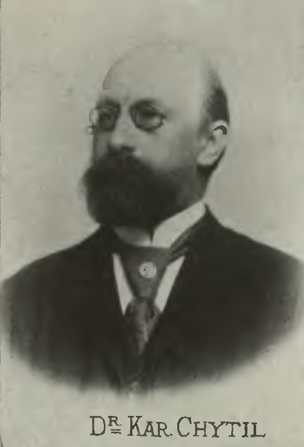 Portrét – Karel Chytil (1857 - 1934), Český historik umění.